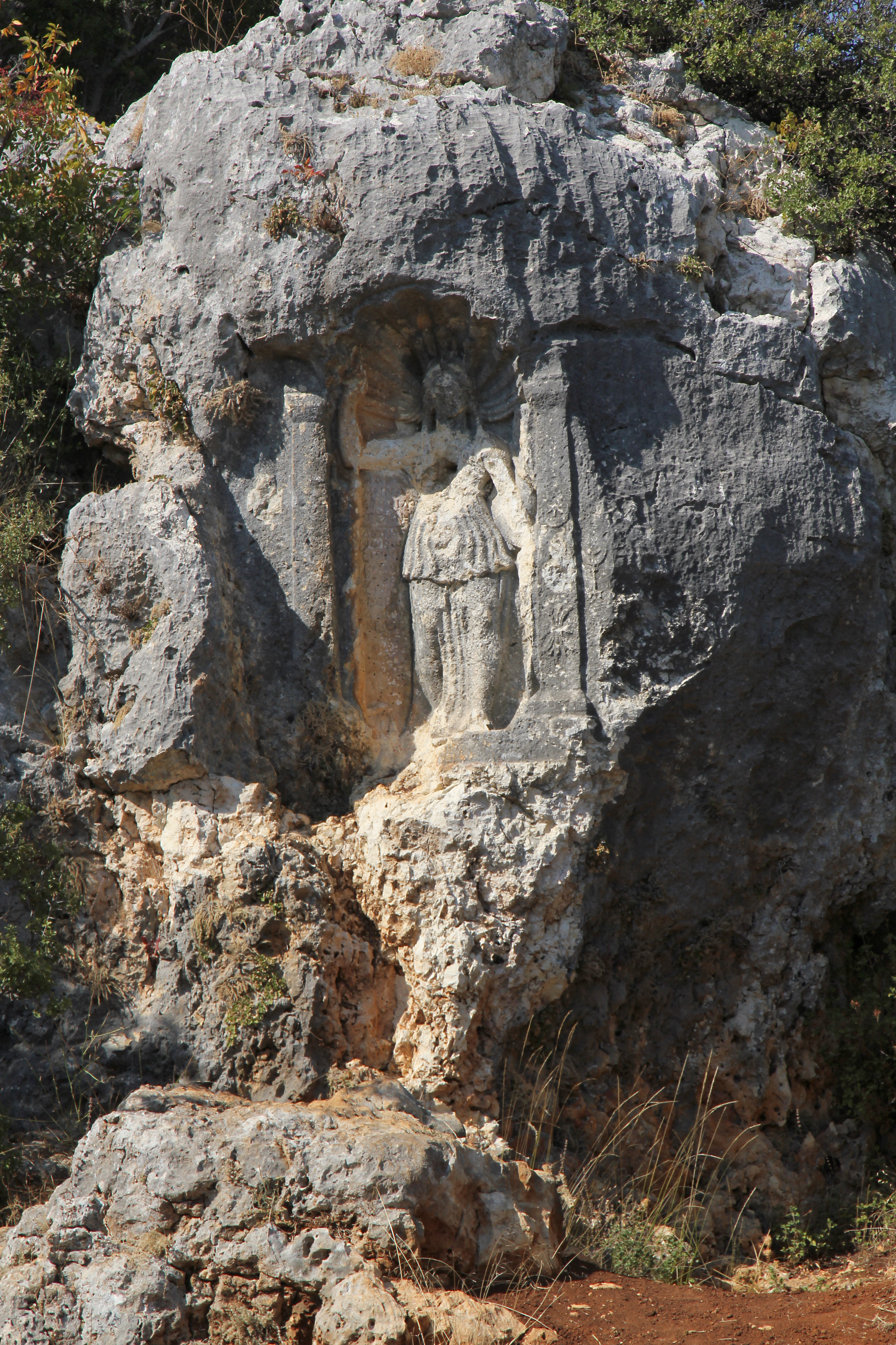 Athena-Relief bei Sömek, Südtürkei